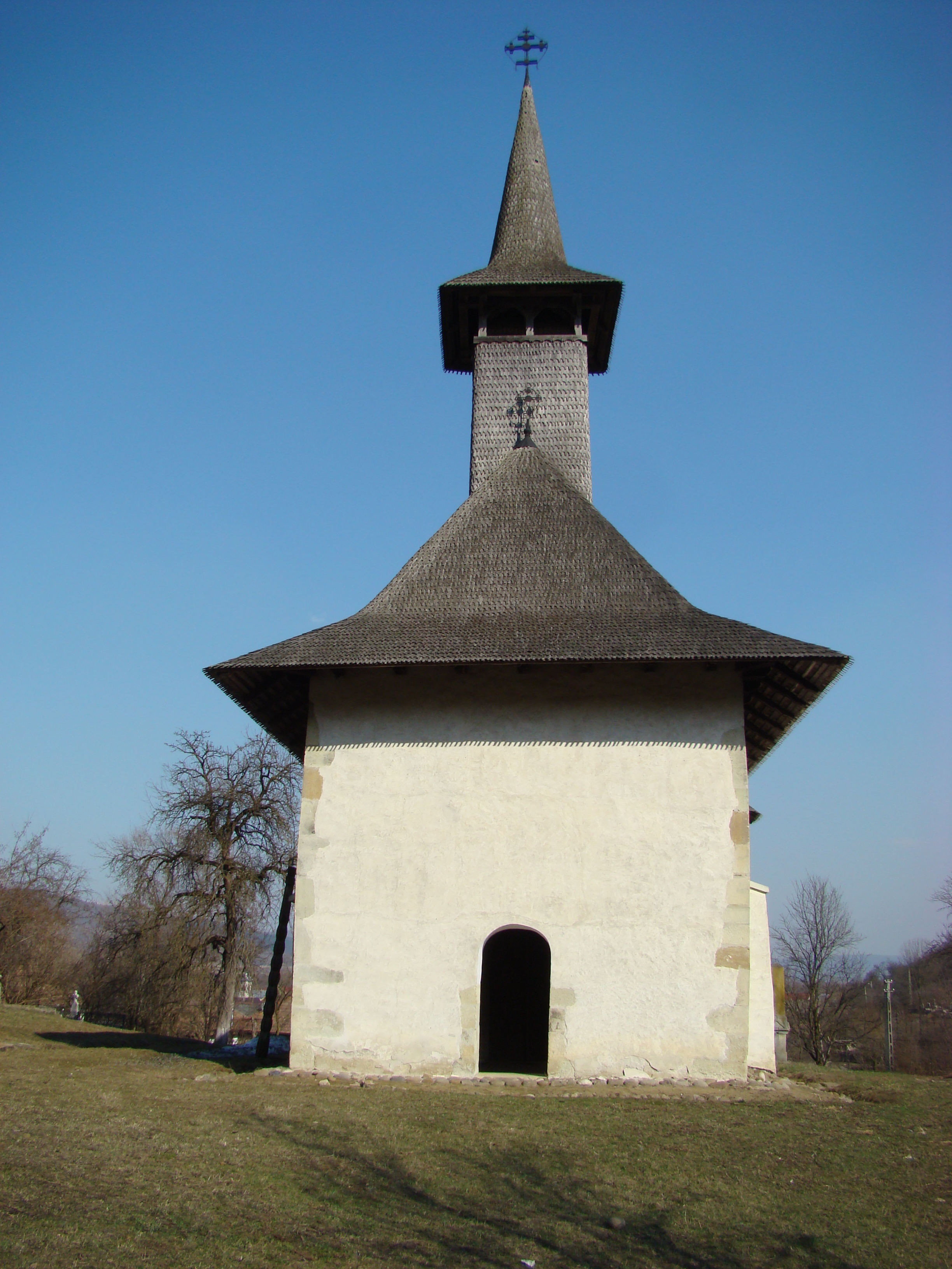 Biserica "Adormirea Maicii Domnului" a mănăstirii Vadului , sat Vad, județul Cluj